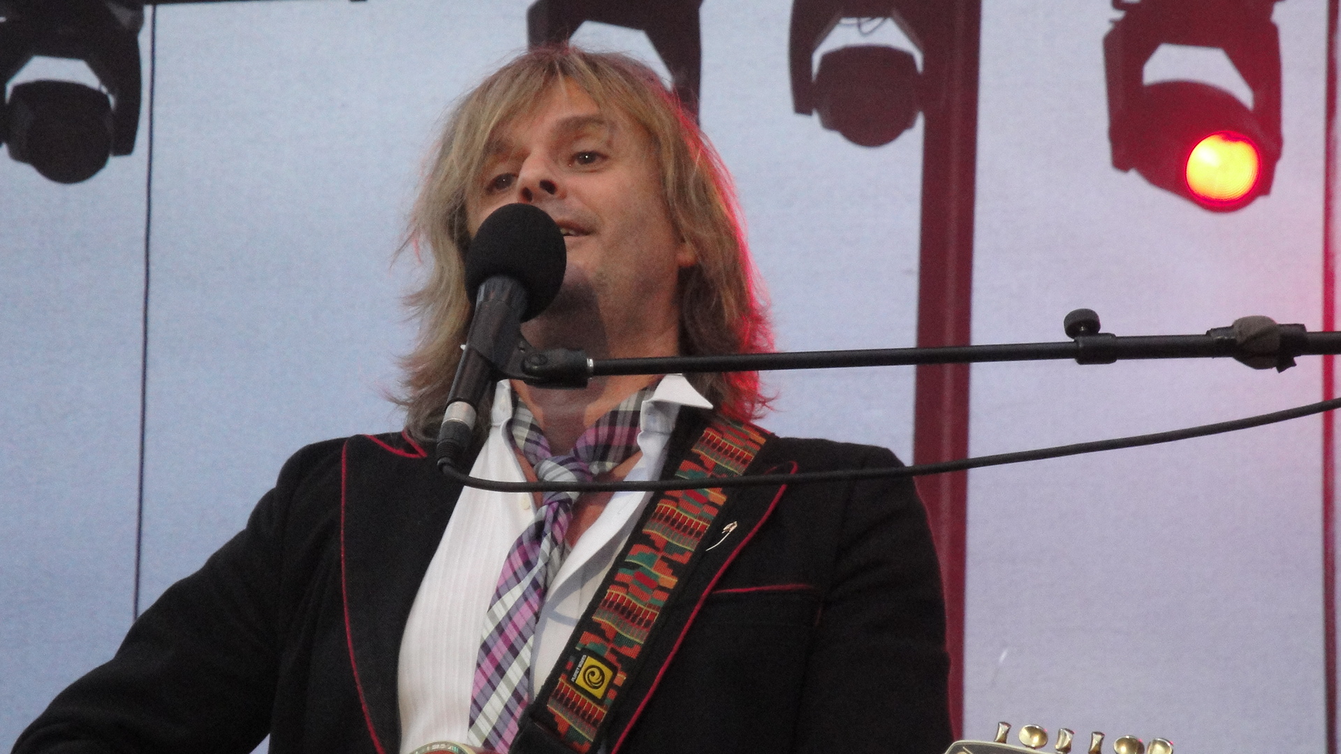 Nilda Fernandez en concert à Tours en juin 2010